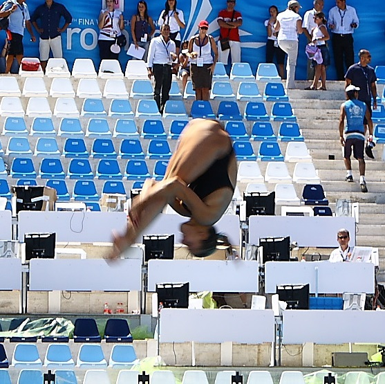 Tania Cagnotto si tuffa ai campionati mondiali di Roma 2009